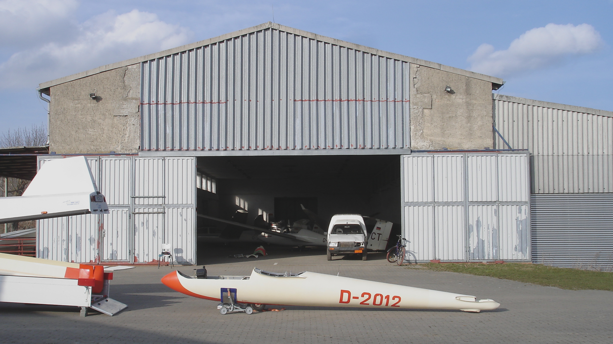 Flugzeughalle mit Toröffnung nach Südwesten. Im Vordergrund Rumpf einer Akaflieg Braunschweig SB 5 b, D-2012